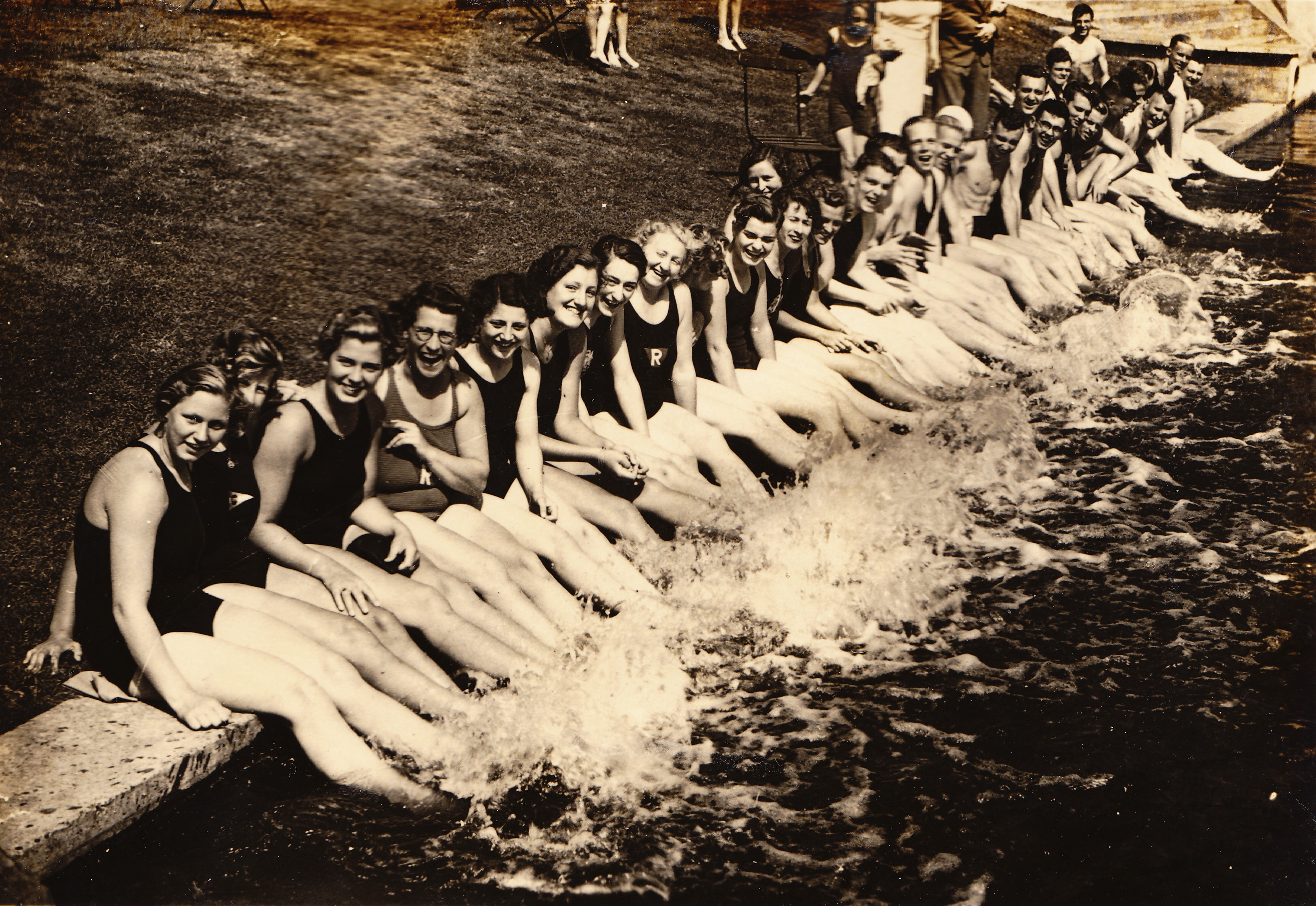 Nederlands zwem-elite bij de Europeesche kampioenschappen 1938 te Londen. Men ziet o.m. Jopie Waalberg (derde van links), Iet van Feggelen (zesde) en Cor Kint (zevende). Geheel rechts onze zwemmers en het waterpoloteam.